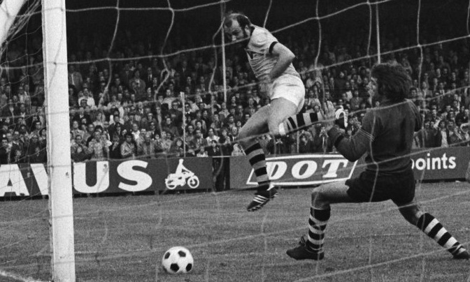 Herman Veenendaal (l.) (1976)